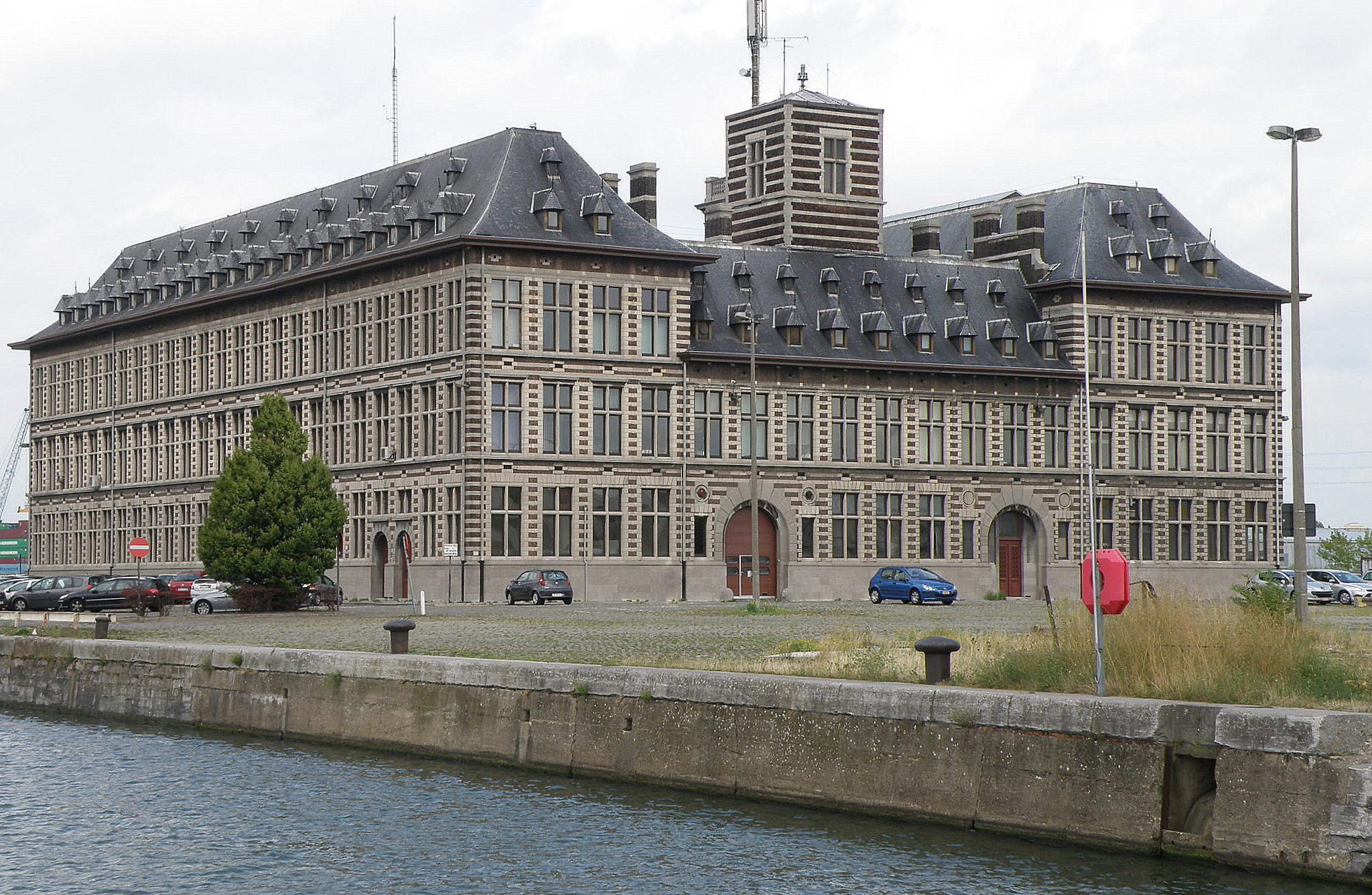 Antwerpen, België. Brandweerkazerne aan de Siberiastraat, in het oudere gedeelte van de Antwerpse haven. Bouwjaar 1922, n.o.v. stadsbouwmeester Emiel Van Averbeke, geïnspireerd op het in 1893 afgebrande Hansahuis.